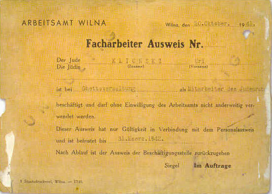 Arbeitschein im Ghetto Wilna (Vilna, Vilnius) für den Juden Uri Elichski, 1941.